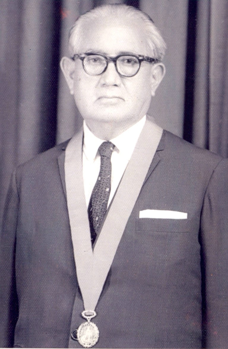 Teodoro Casana Robles